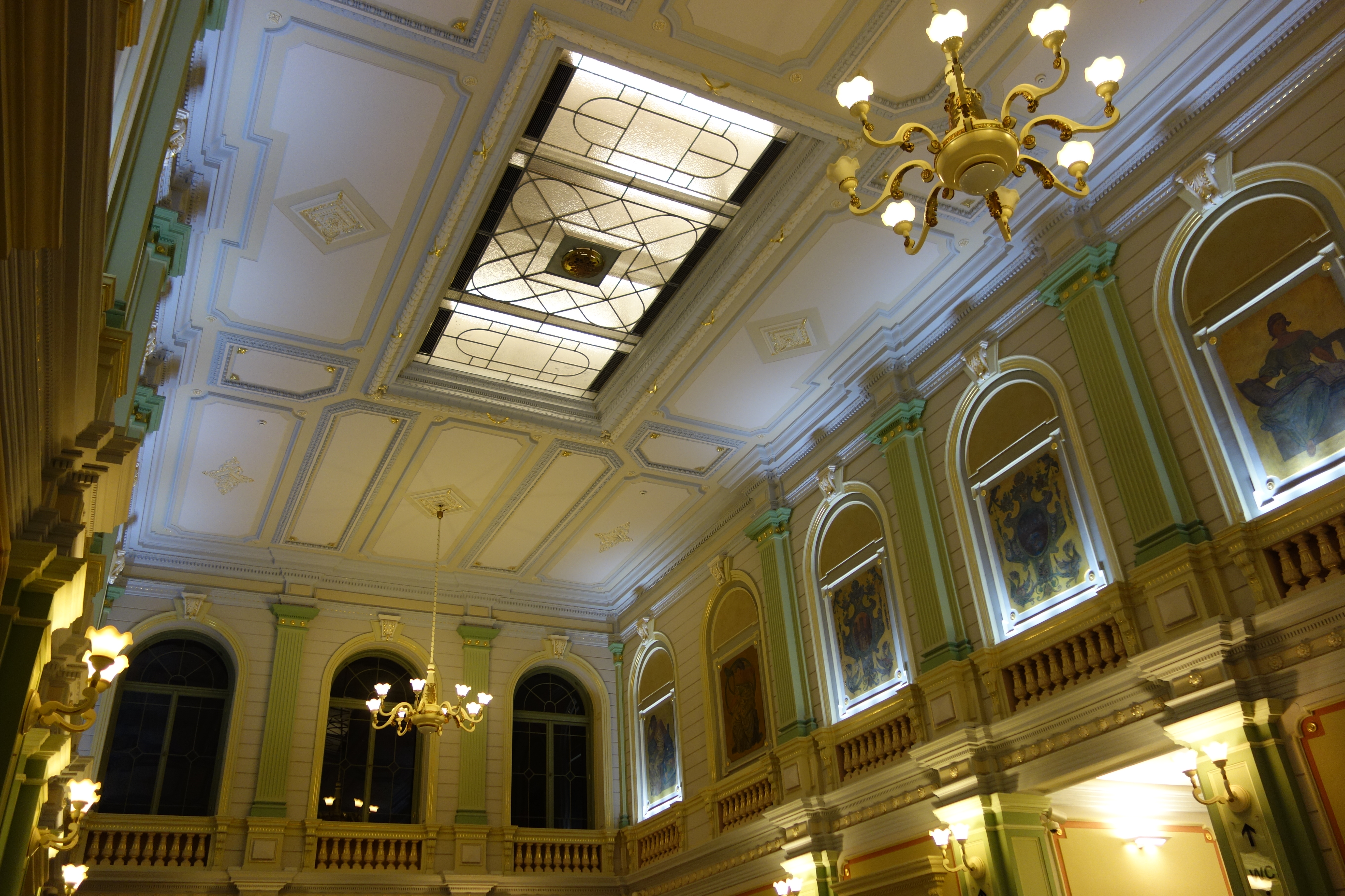 Przemyśl Główny , You can see all photographs in category Wikiekspedycja kolejowa 2014.